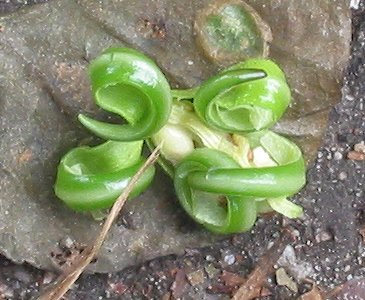 (nl: Reuzenbalsemien opengesprongen vrucht) Impatiens glandulifera fruit